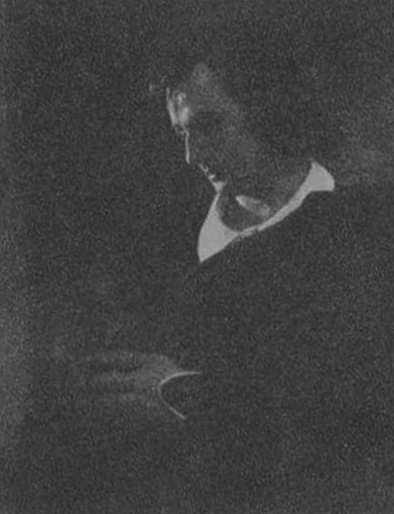 Adam Poulsen som Hamlet 1919